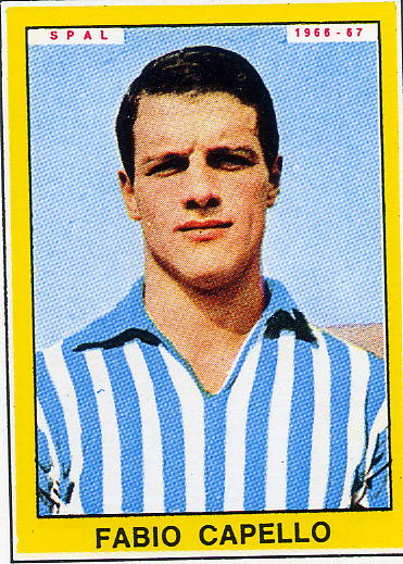 Fabio Capello che indossa la maglia del Spal